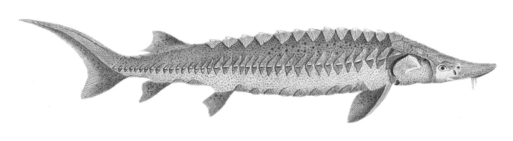 Acipenser (Antaceus) buffalo = Acipenser fulvescens